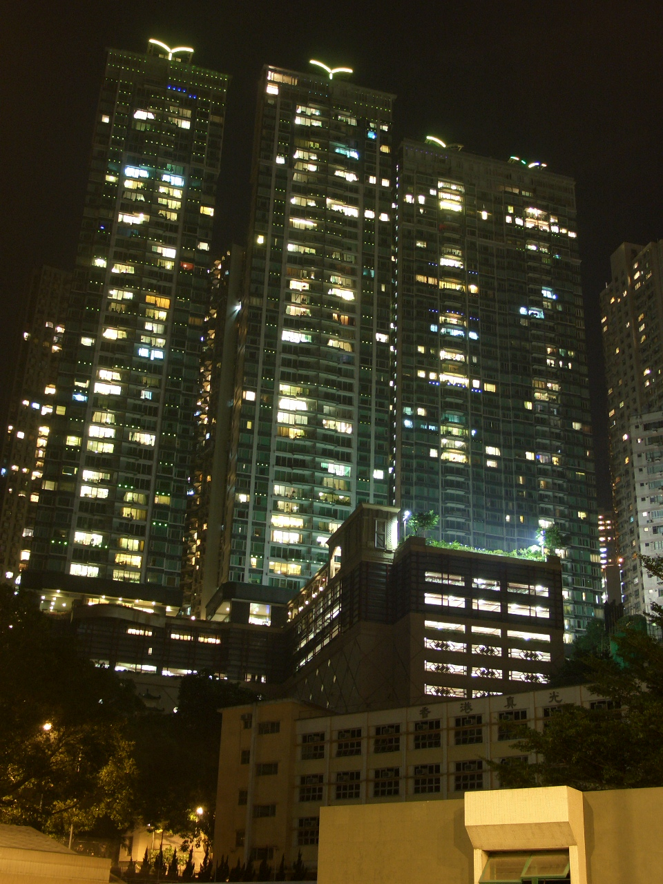 中文（香港）: 夜晚時分的名門。